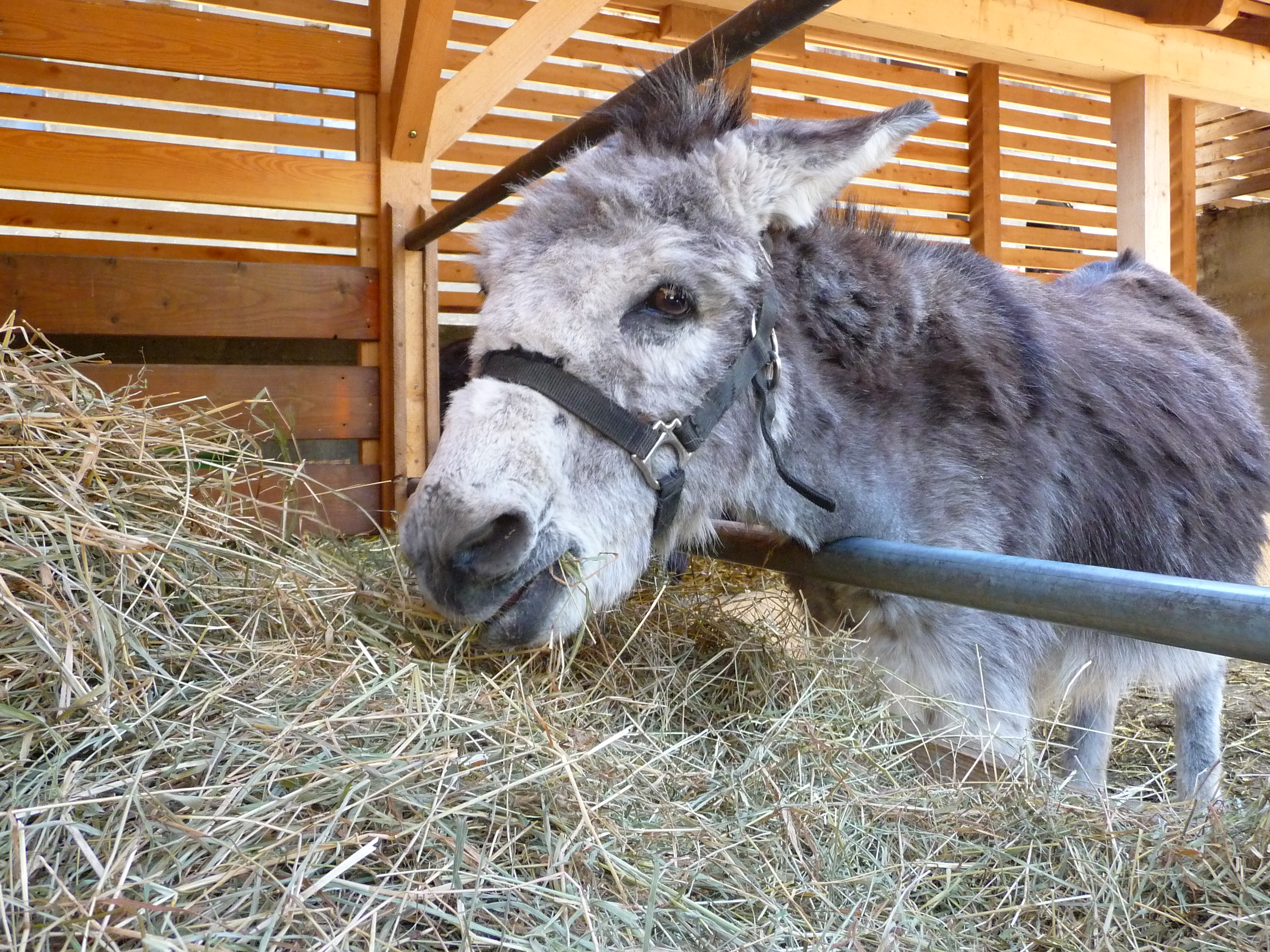 Hausesel (Equus asinus asinus) beim Fressen